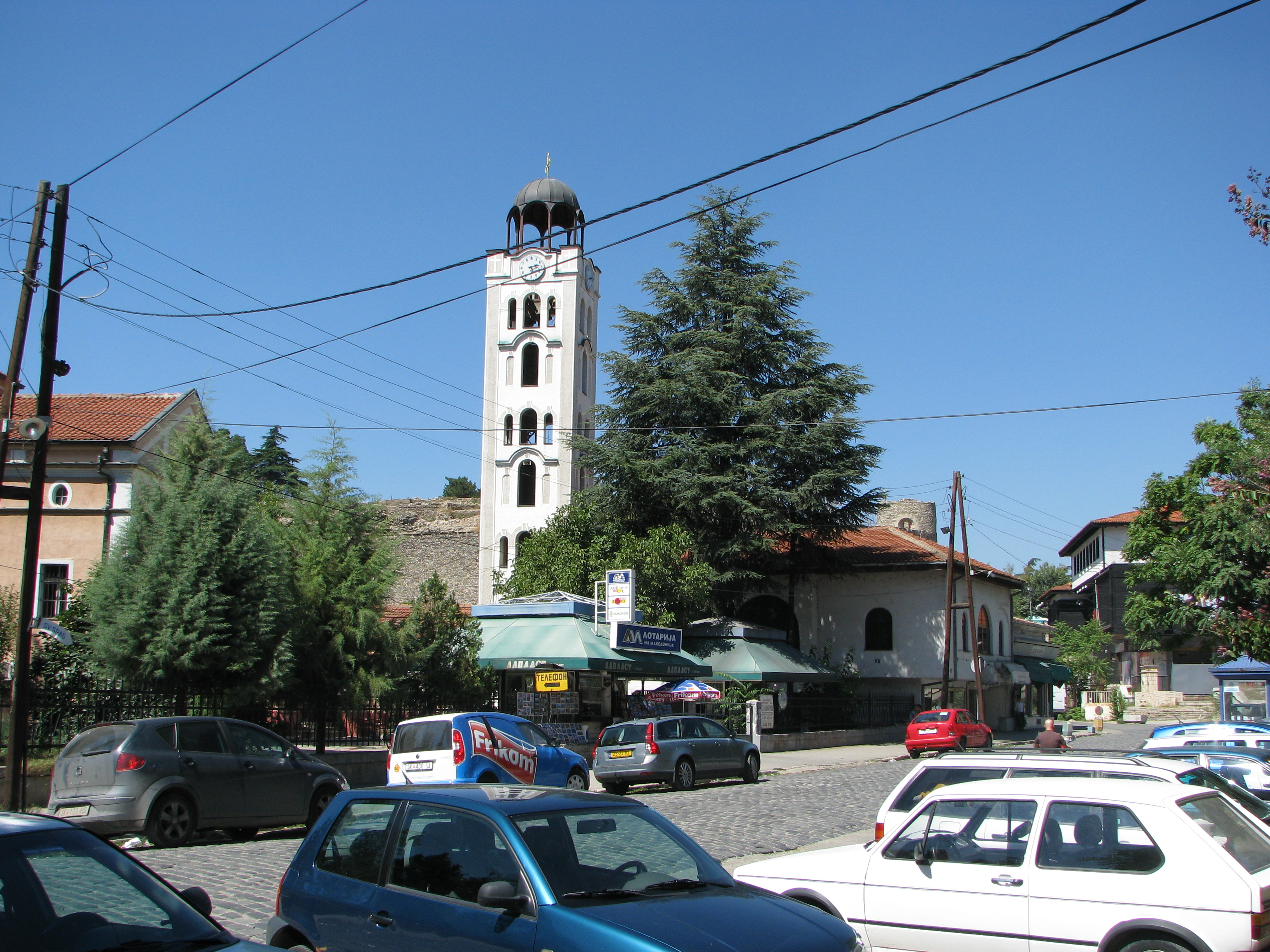 Църквата „Свети Димитър“ в Скопие, Република Македония